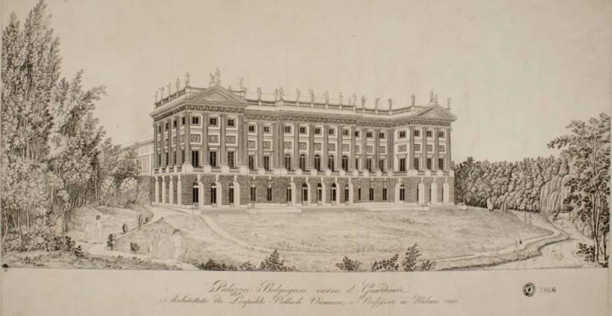 AUTORE: Leopoldo Pollack TITOLO: Palazzo Belgiojoso verso il Giardino / Architettato da Leopoldo Pollach Viennese, e Professore in Milano 1790 DATA: 1790 COLLOCAZIONE: Milano, Civica Raccolta delle Stampe “A. Bertarelli” TECNICA E SUPPORTO: Stampa da lastra DIMENSIONI: mm. 530 x 750